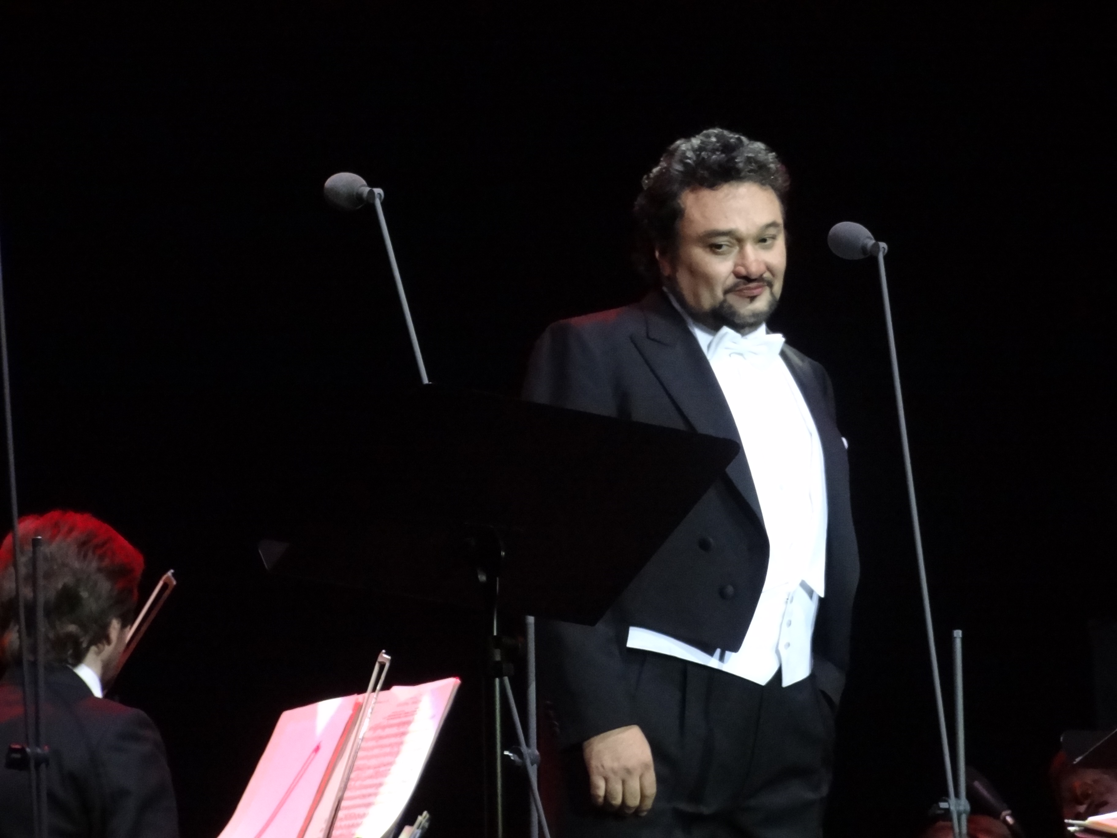 Ramón Vargas, Юбилейный концерт Дмитрия Хворостовского, Санкт-Петербург, 2013